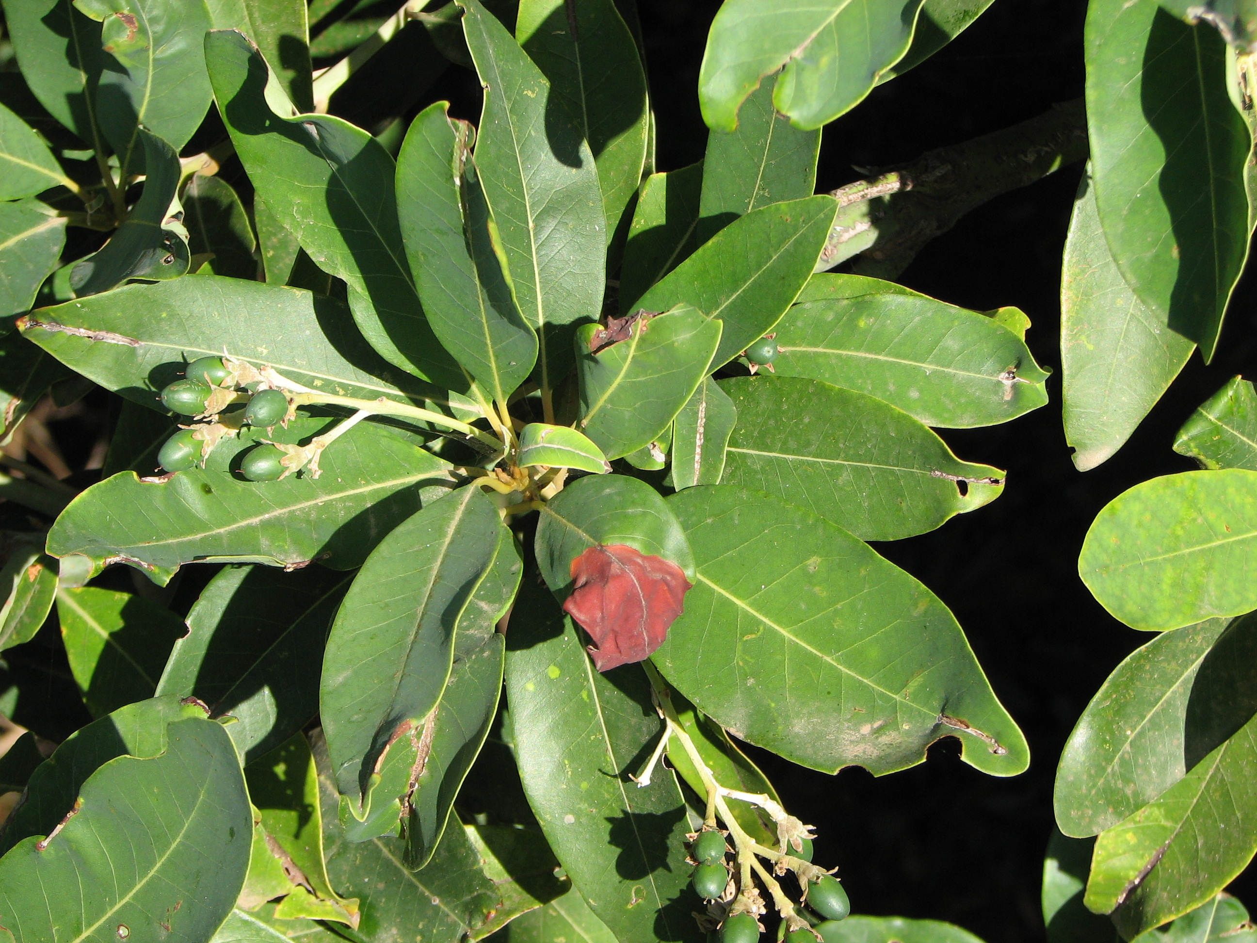 Viñátigo (Persea Indica). Detalle de las hojas. La Furnia, Icod de los Vinos, Tenerife.